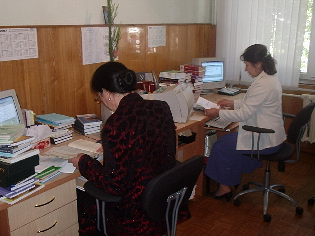 Кітап толықтыру бөлімі